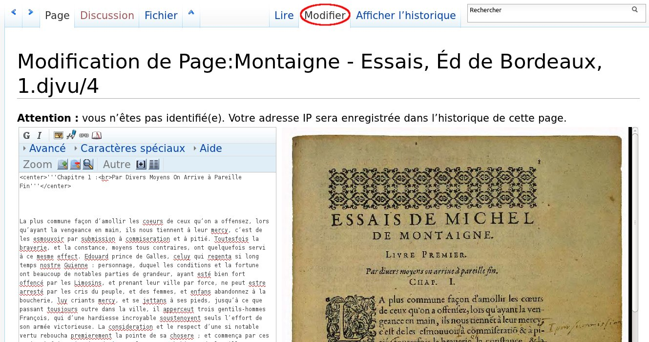 Capture d'écran de l'édition d'une page de Wikisource.